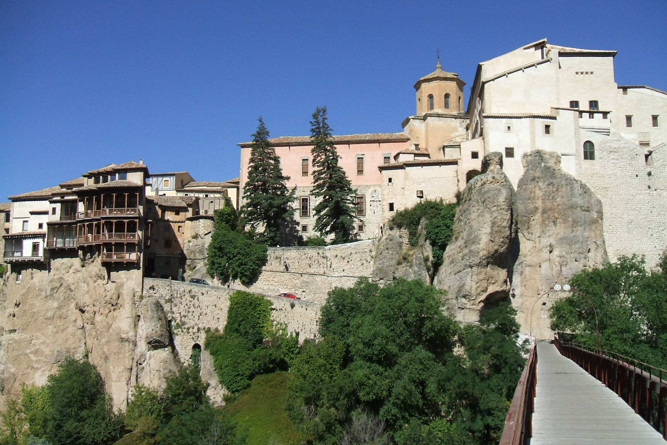 Panorámica de Cuenca, puente de San Pablo, Casas Colgadas y Catedral